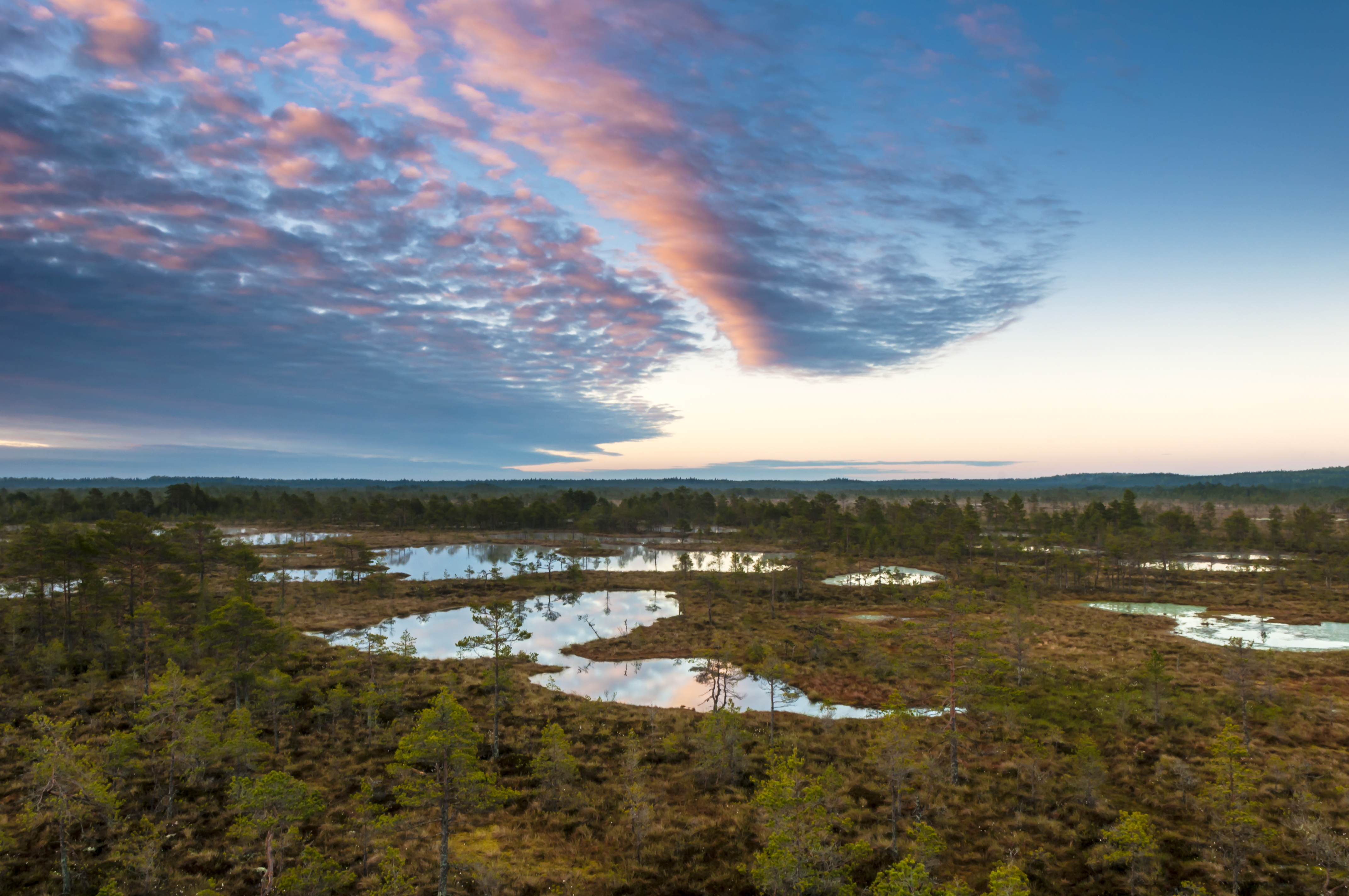 Kõnnu Suursoo. Põhja-Kõrvemaa LKA.